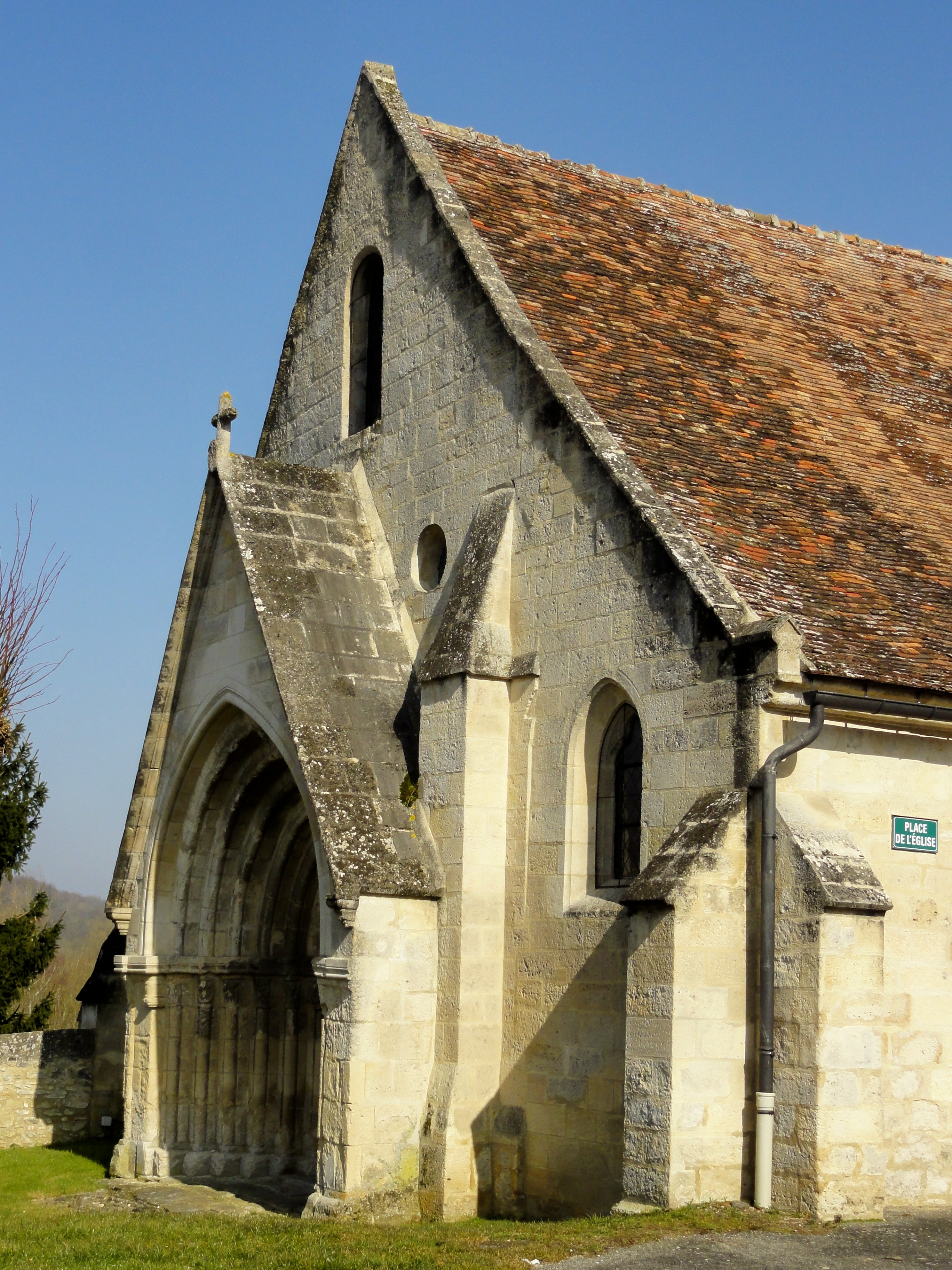 Façade occidentale.